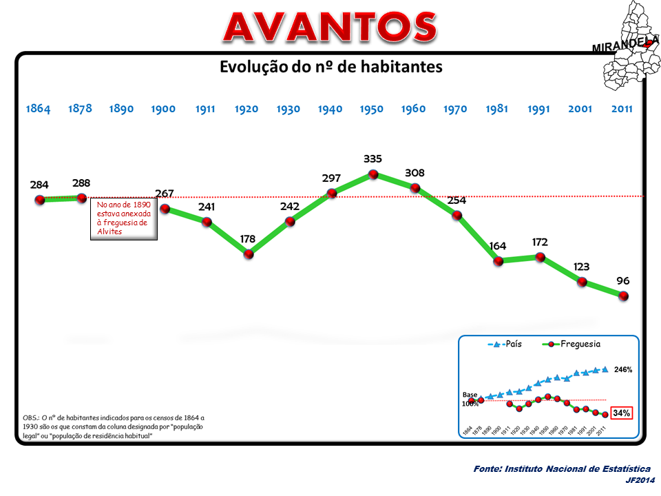 Evolução da População 1864 / 2011